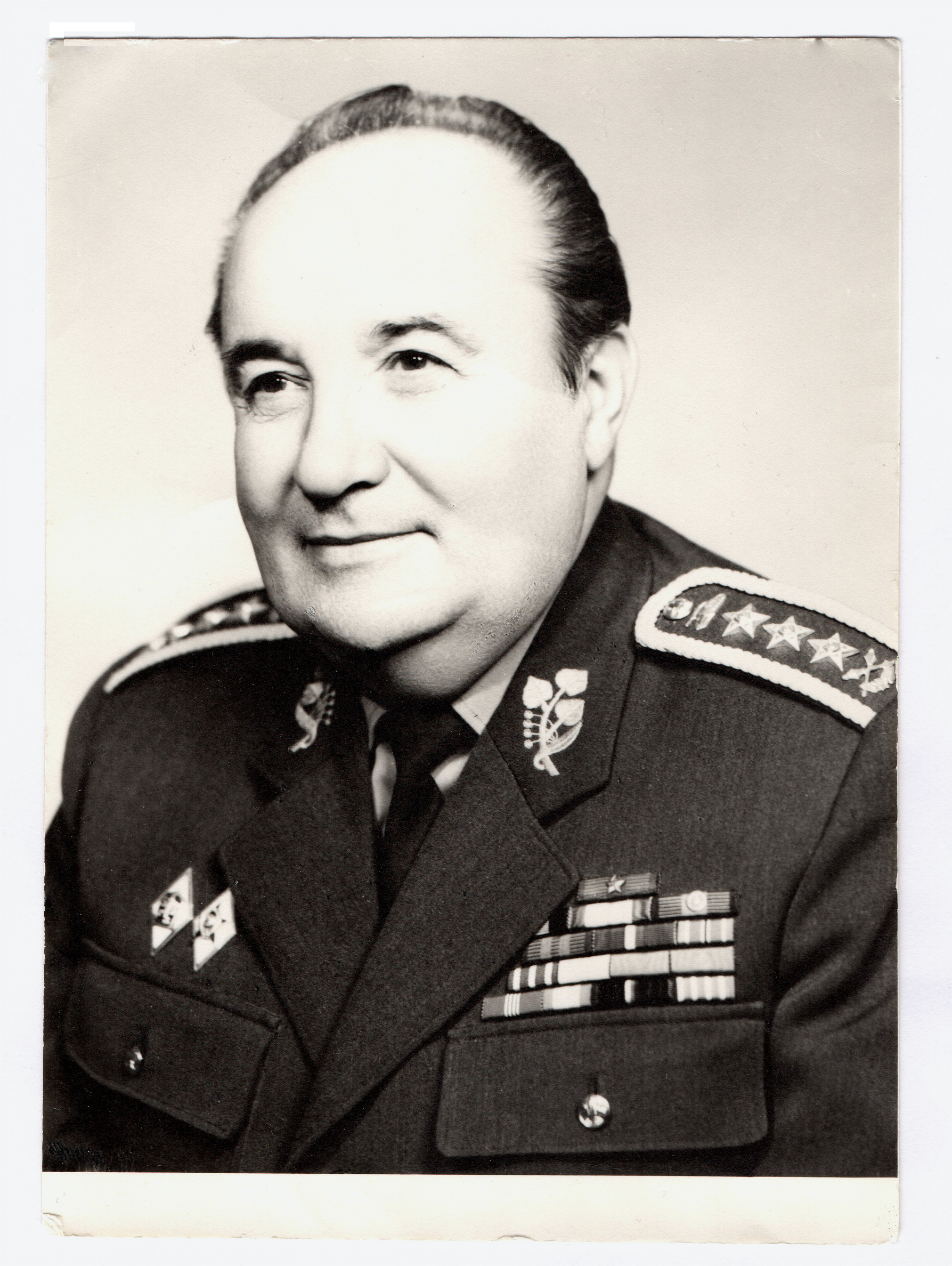 Fotografia generálplukovníka Ing. Jozefa Hrebíka